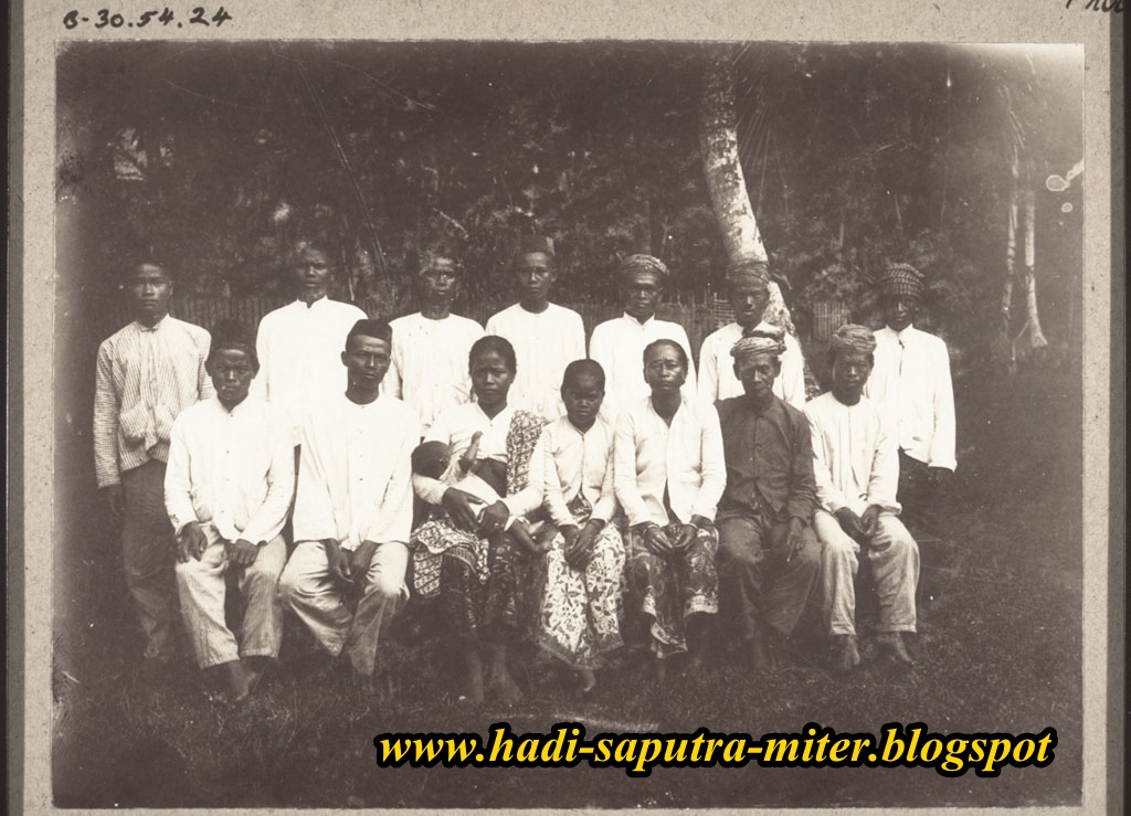 masyarakat Maanyan setelah di baptis tahun 1920an